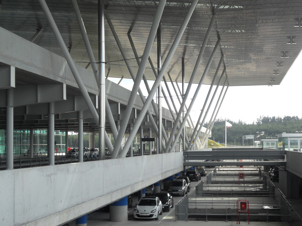 Exterior de la terminal de pasajeros del aeropuerto de Santiago de Compostela